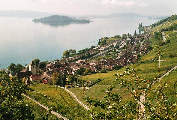 Twann am Bielersee mit Petersinsel, Schweiz (Oktober 2000)